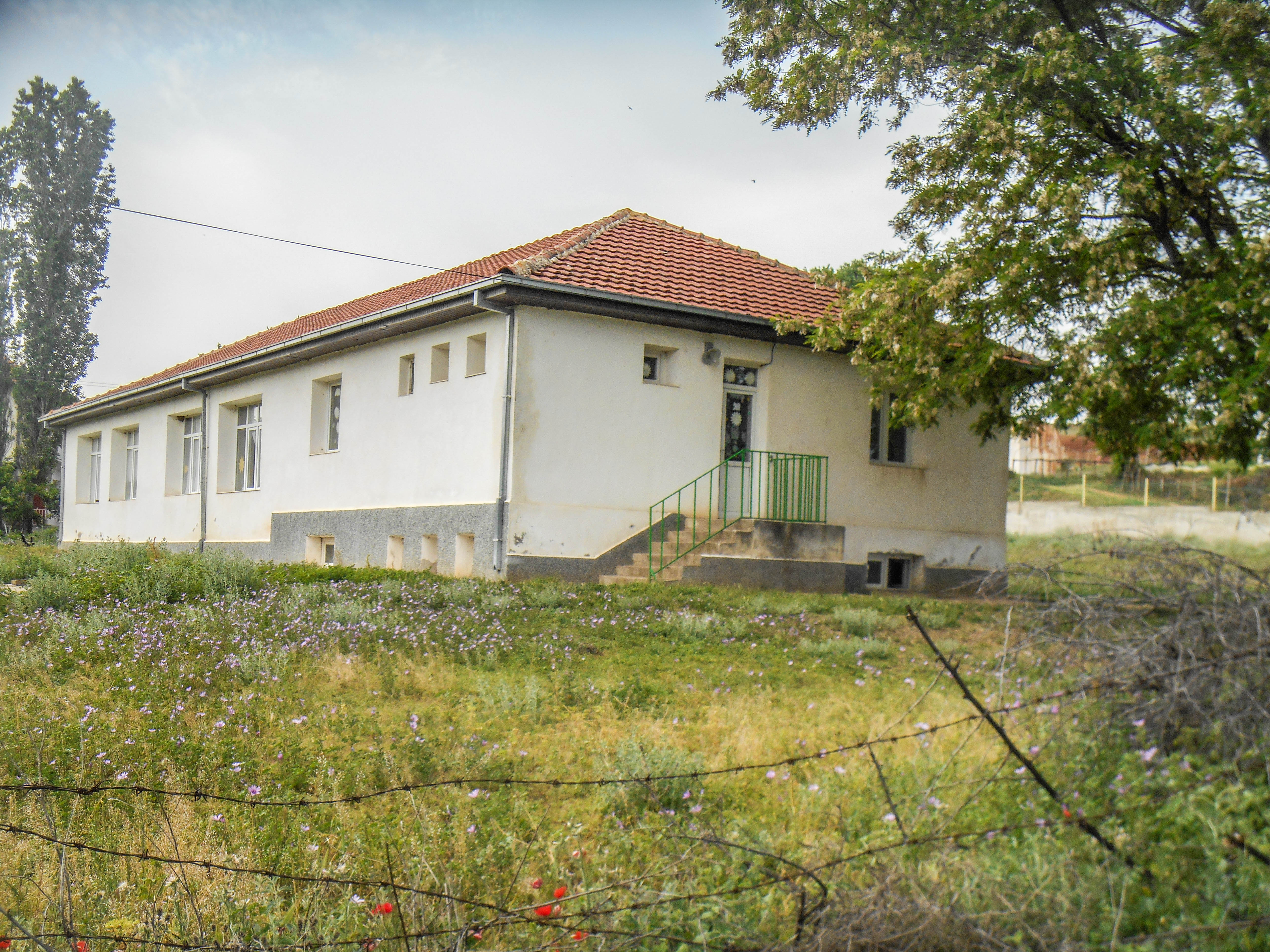 Основно училиште „Гоце Делчев“ - Владиевци